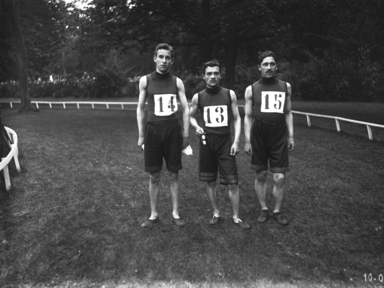 Membres du Stade saint-germanois le 20 mai 1906 au bois de Boulogne à Paris pour le challenge du Mille, deuxième série. Le club est vainqueur, avec M. Audirac 1er et M. Vanson 2ème (non identifiés sur la photo). Sources : Le Matin du 21 mai 1906 ( et Le Petit journal du 21 mai 1906 (